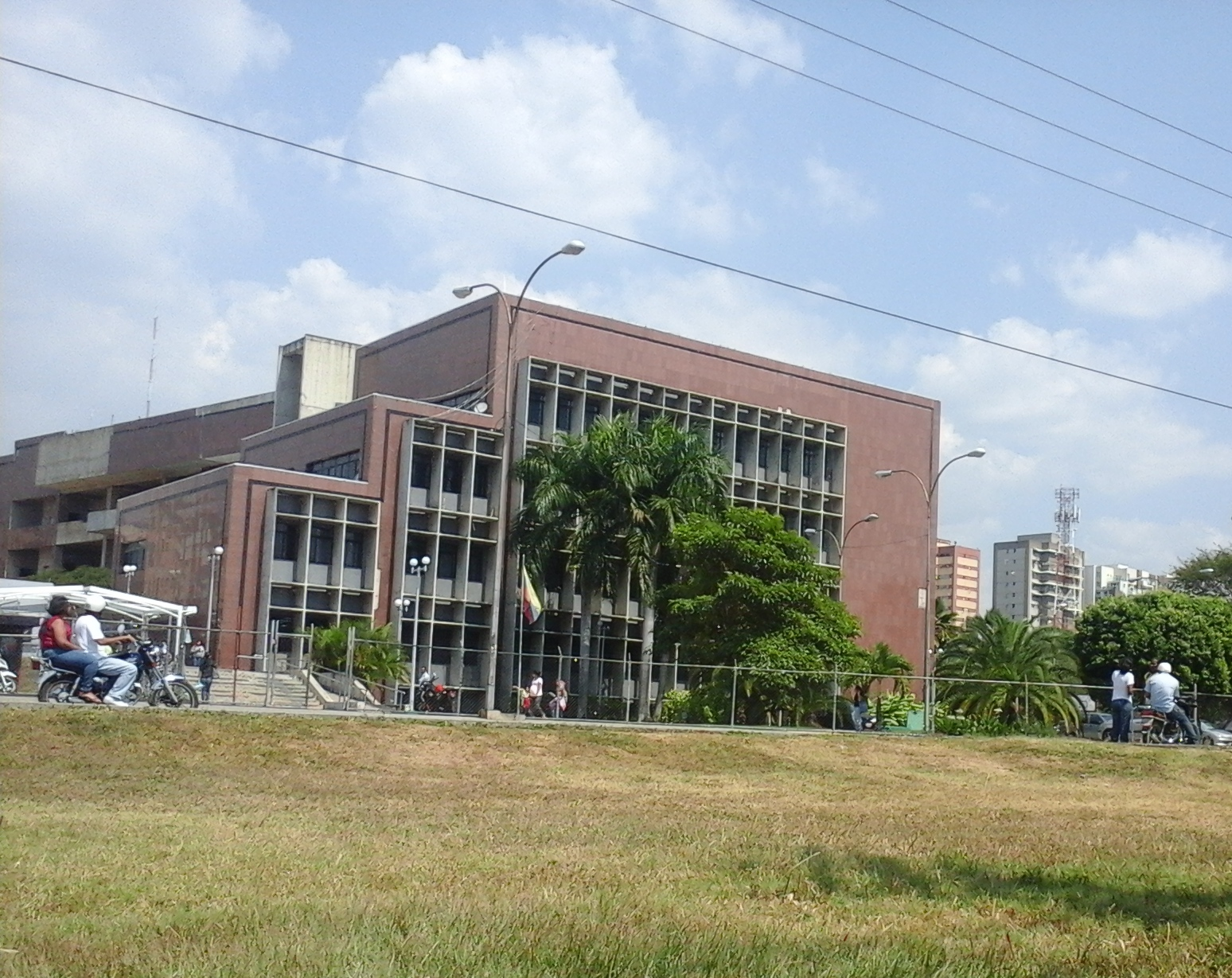 Urb. San Isidro, Maracay, Aragua, Venezuela